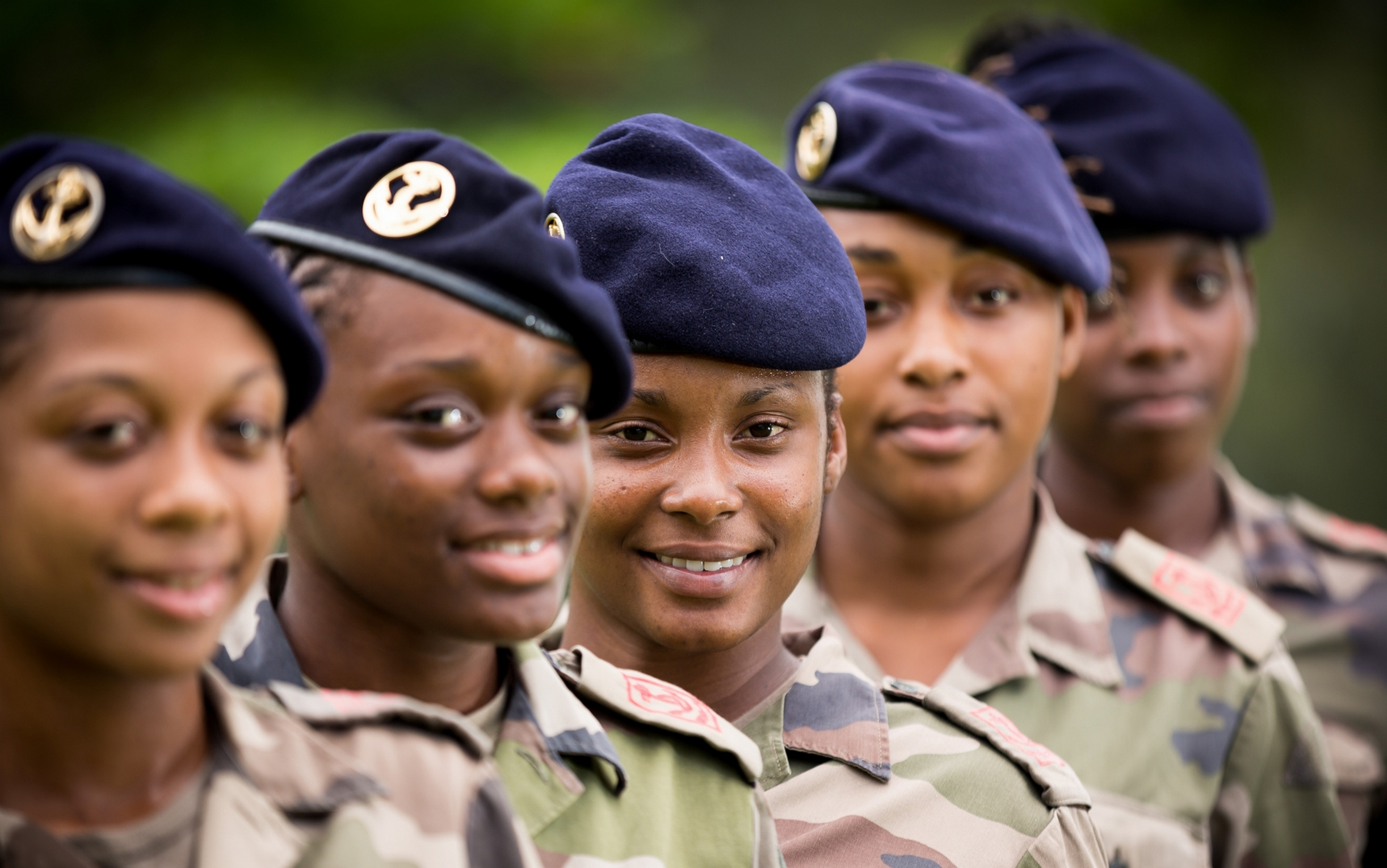 Photo de jeunes volontaires du RSMA de la Guadeloupe